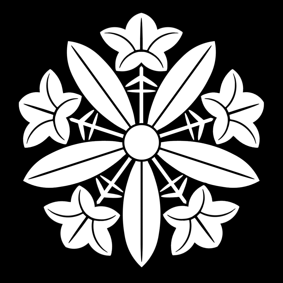 「久我山竜胆」紋（染抜）